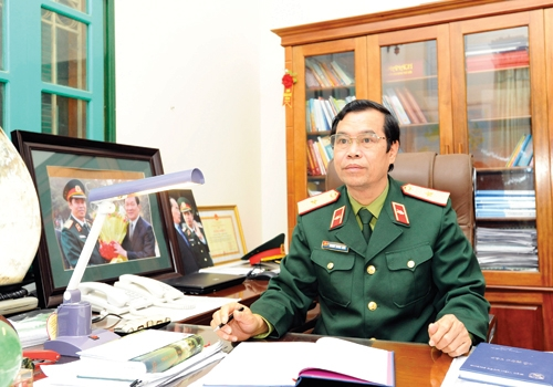 Hoàng Trung Kiên